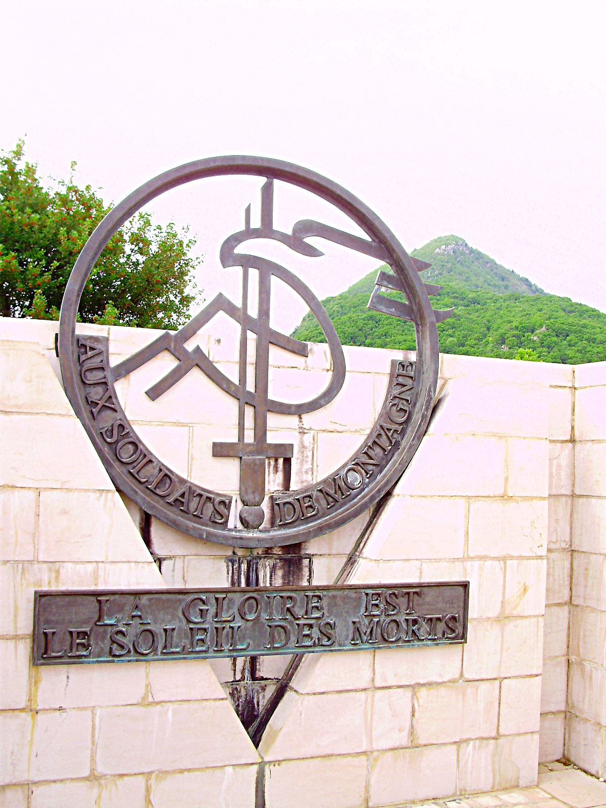 Murette nord du mémorial se laquelle se trouve l'insigne de l'union des troupes de montagne.